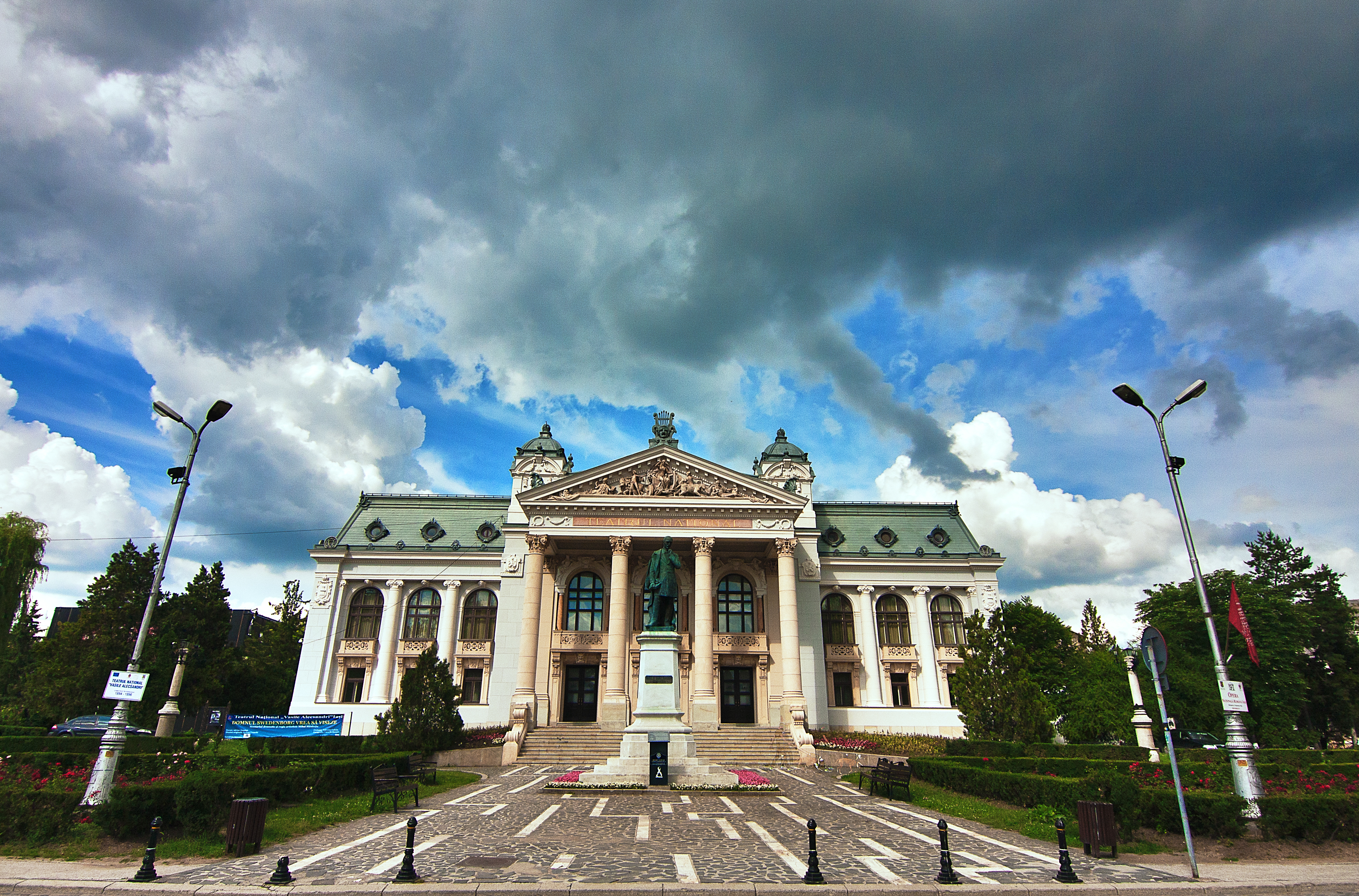 Teatrul National Iasi - vedere din fata